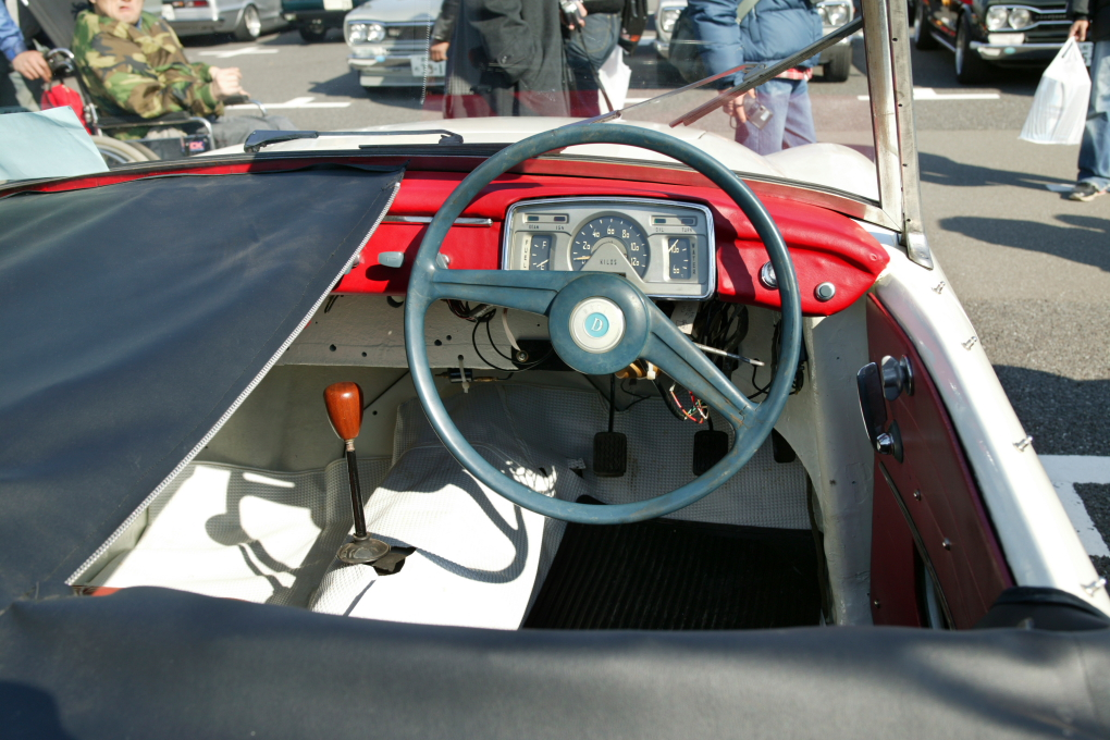 Datsun S211 instrument-panel.